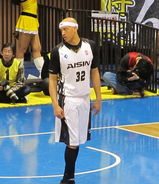 桜木JRの画像